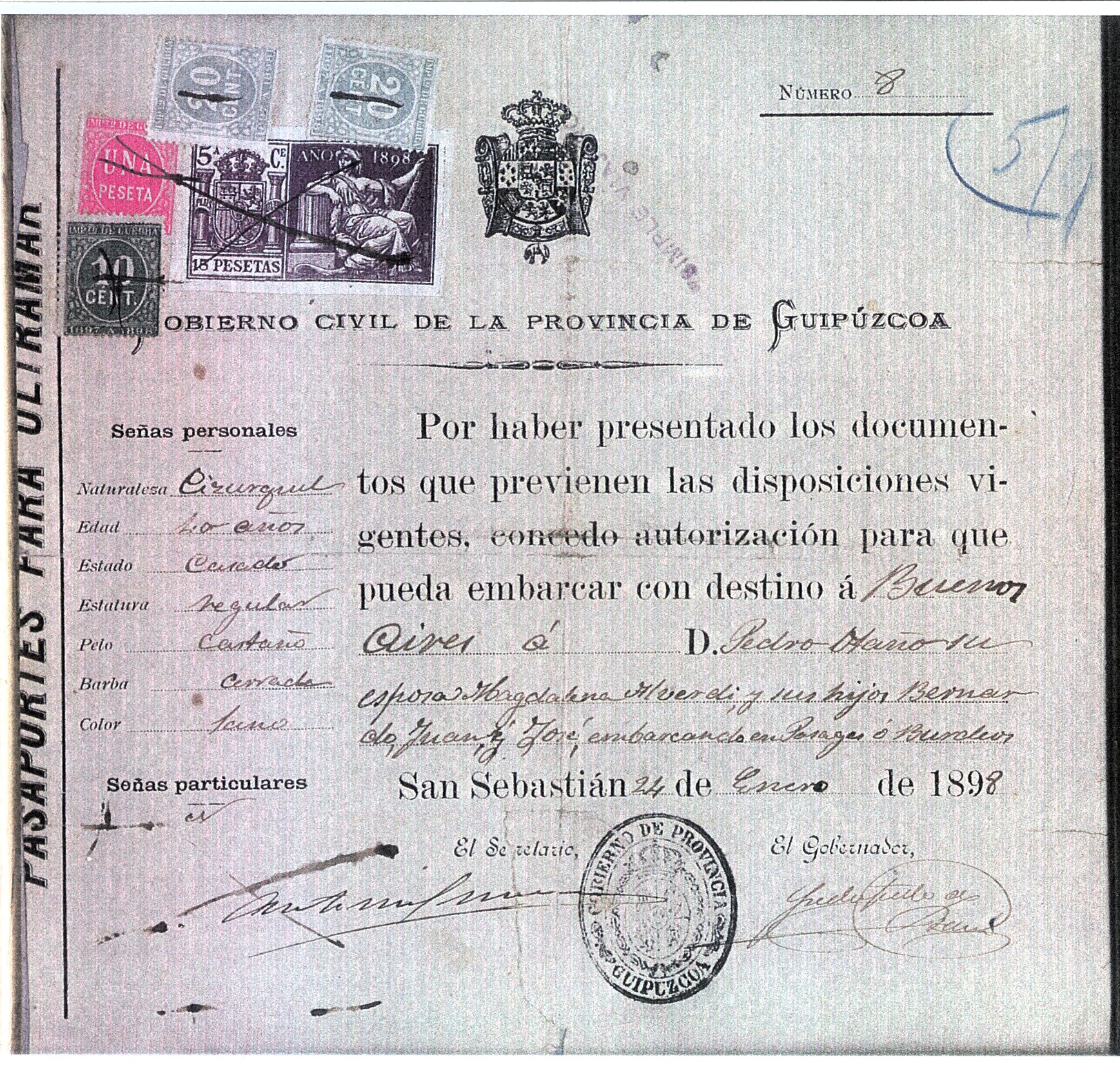 Gobierno Zibilak Otaño eta bere familiari Argentinara joateko emandako baimena (1898). Familiak emandako dokumentua.